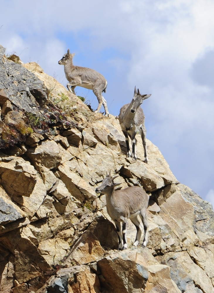 Pseudois nayaur Bharal, Himalayan blue sheep